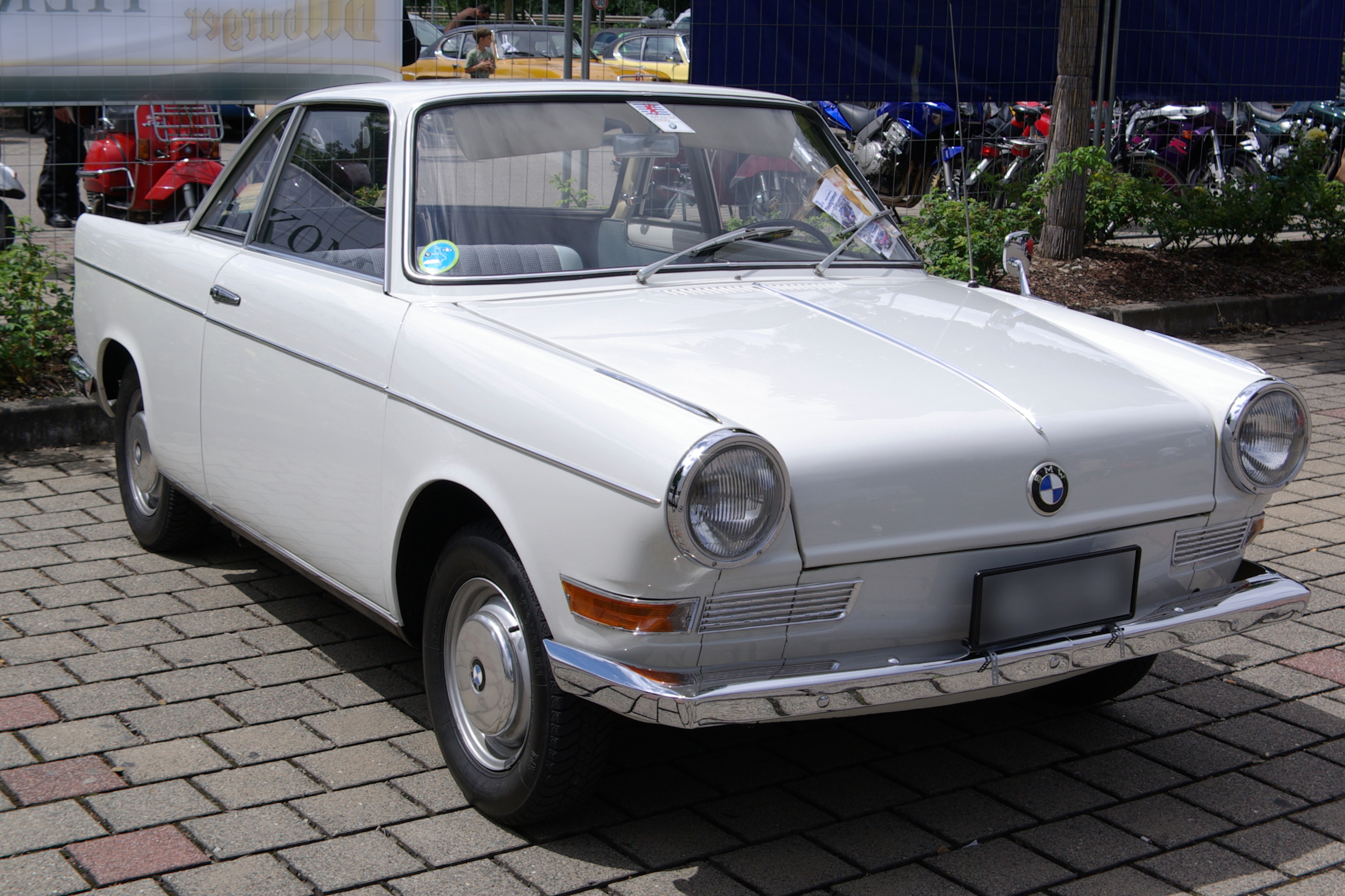 BMW 700 sport, zum Aufnahmezeitpunkt war das Fahrzeug in Luxemburg zugelassen